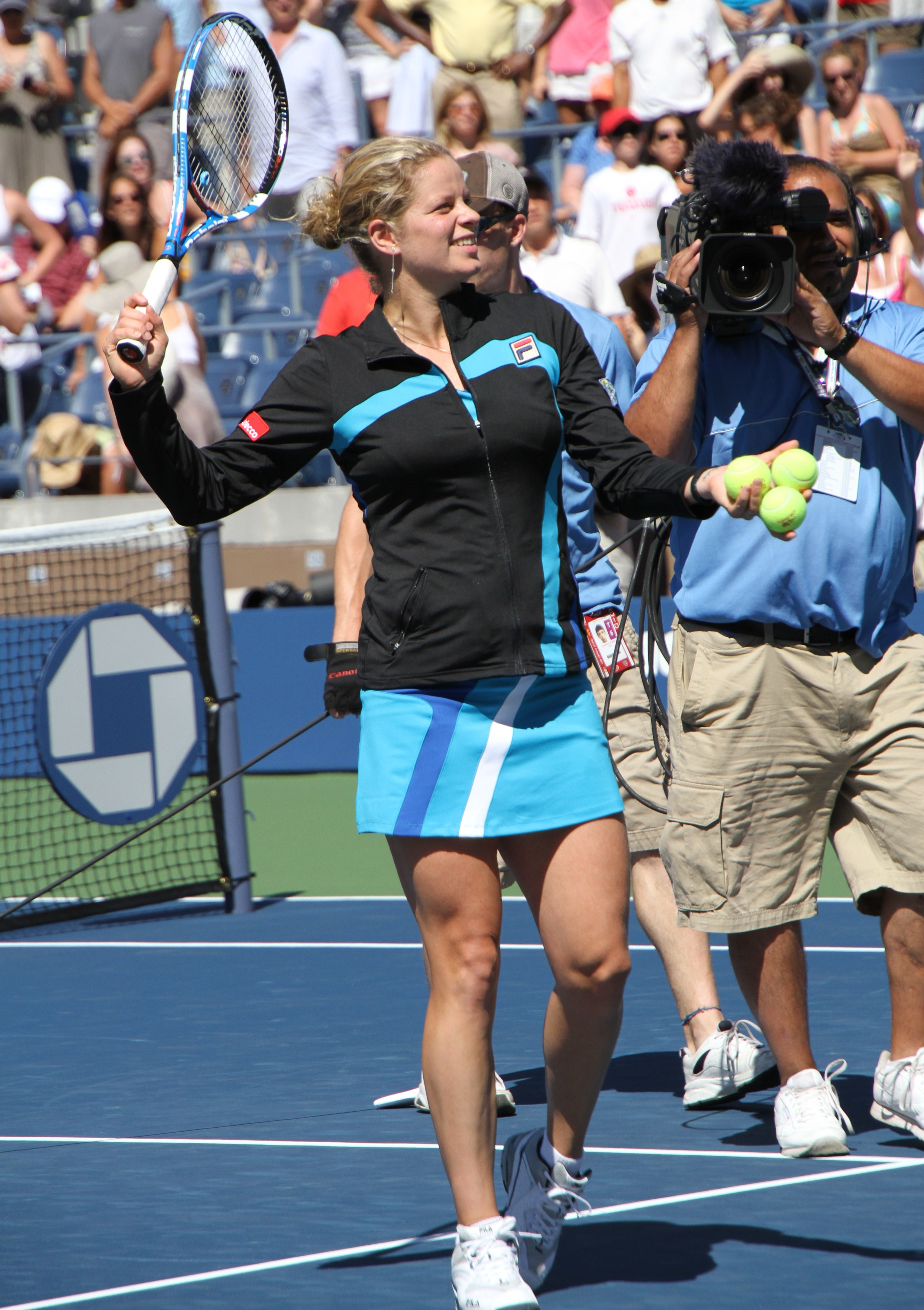 Kim Clijsters